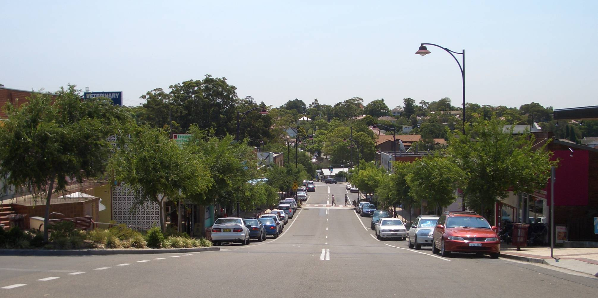 Jannali